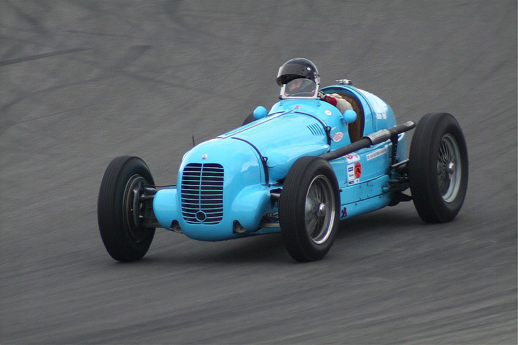 Maserati V8 RI, Baujahr 1935, beim AvD-Oldtimer-Grand-Prix 2011; Wagen von Philippe Étanclein. Vier Exemplare wurden gebaut.